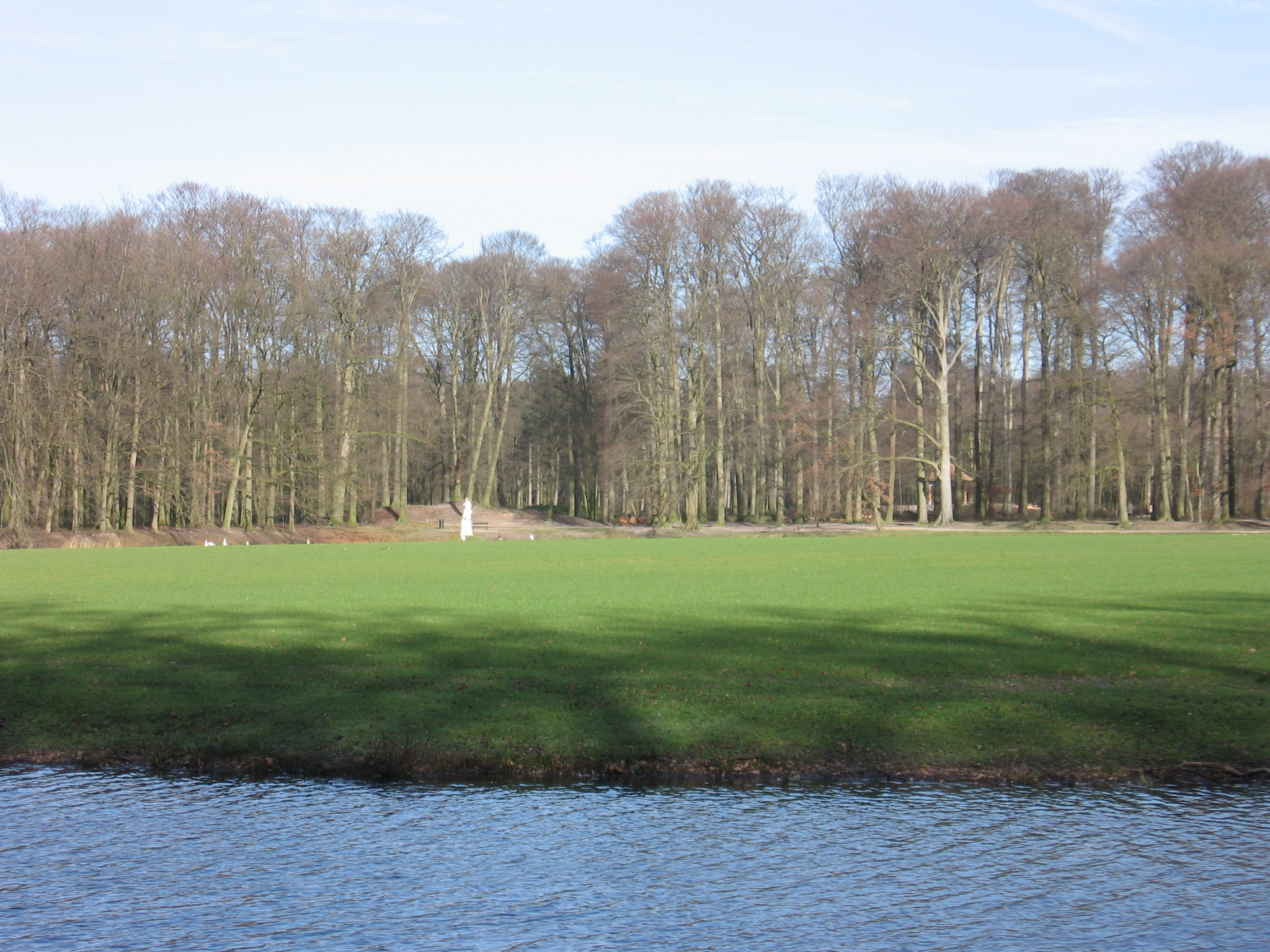 Barneveld, Koewei Schaffelaarse Bos